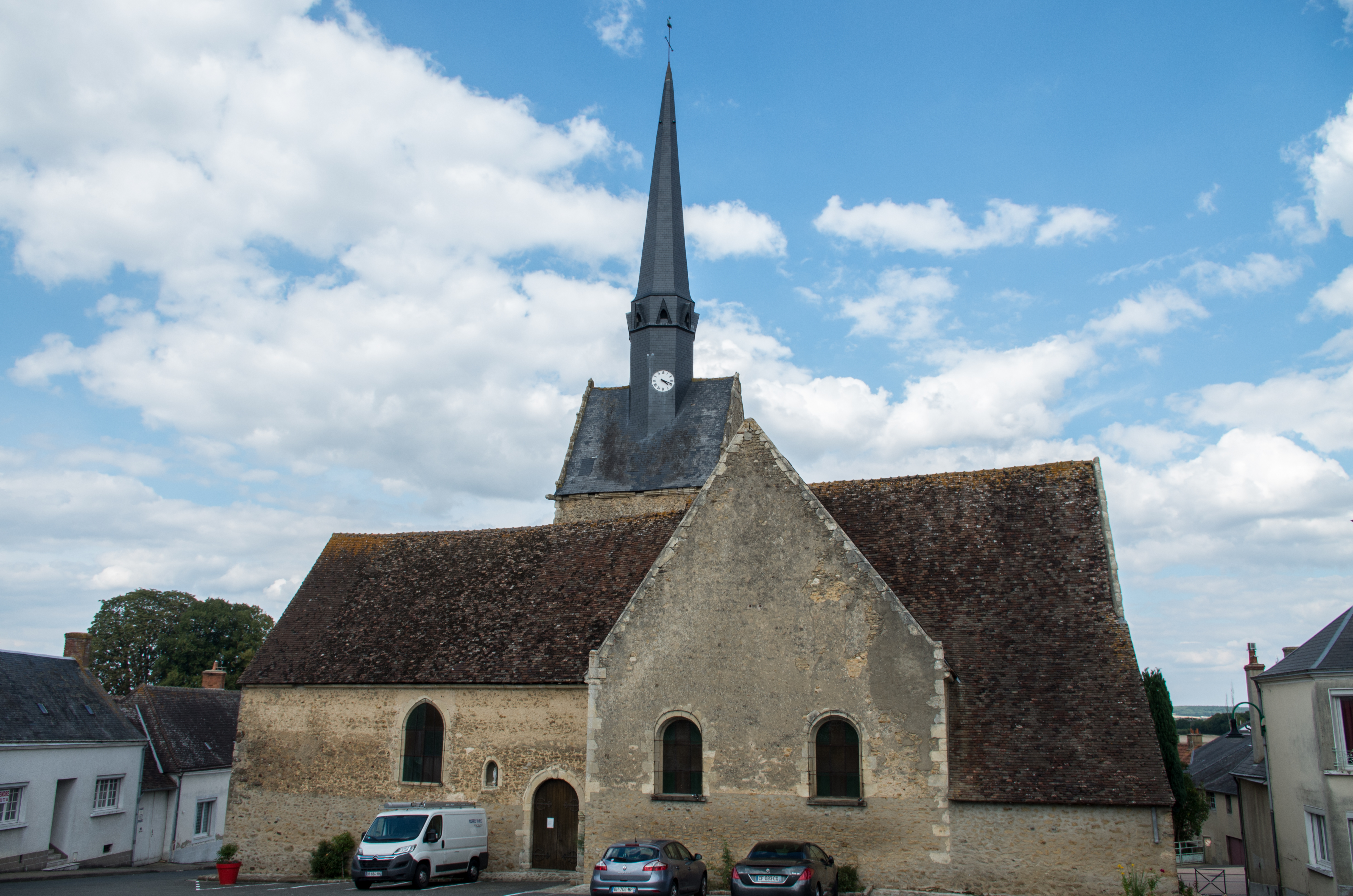 Vue latérale de l'Eglise Saint-Médard